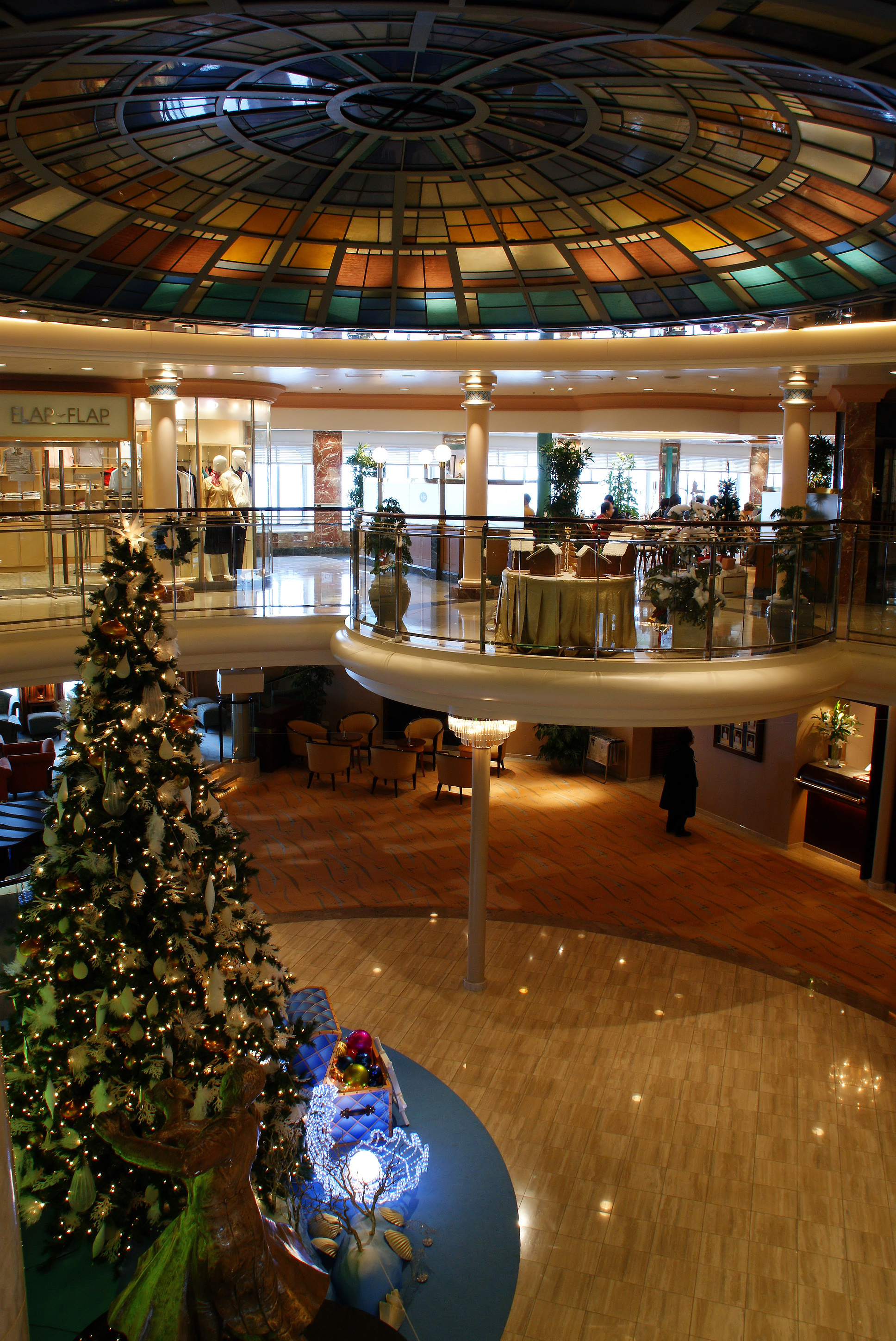 Asuka II, Asuka Plaza. Taken at Beppu Port(Beppu City, Oita Prefecture, Japan).